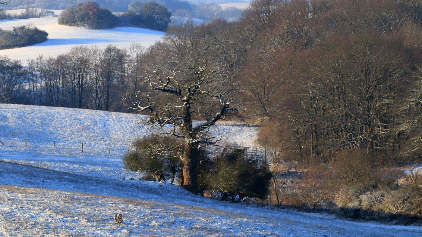 Verschneite Moränenlandschaft bei Burg Schlitz in Mecklenburg